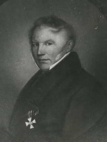 Eestimaa tsiviilkuberner Otto Wilhelm von Essen (1761–1834)